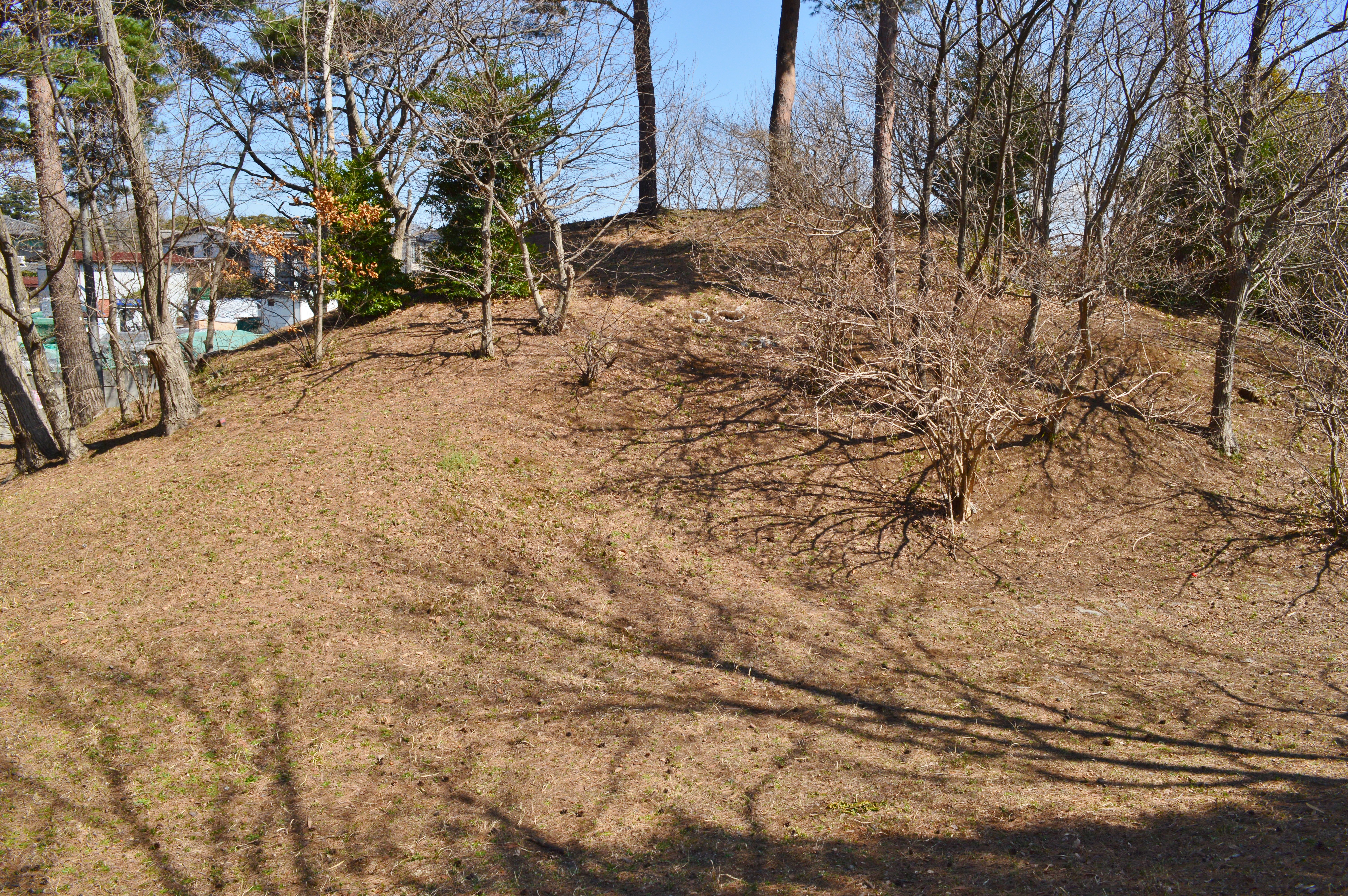 神門5号墳 墳丘 Nikon D3200